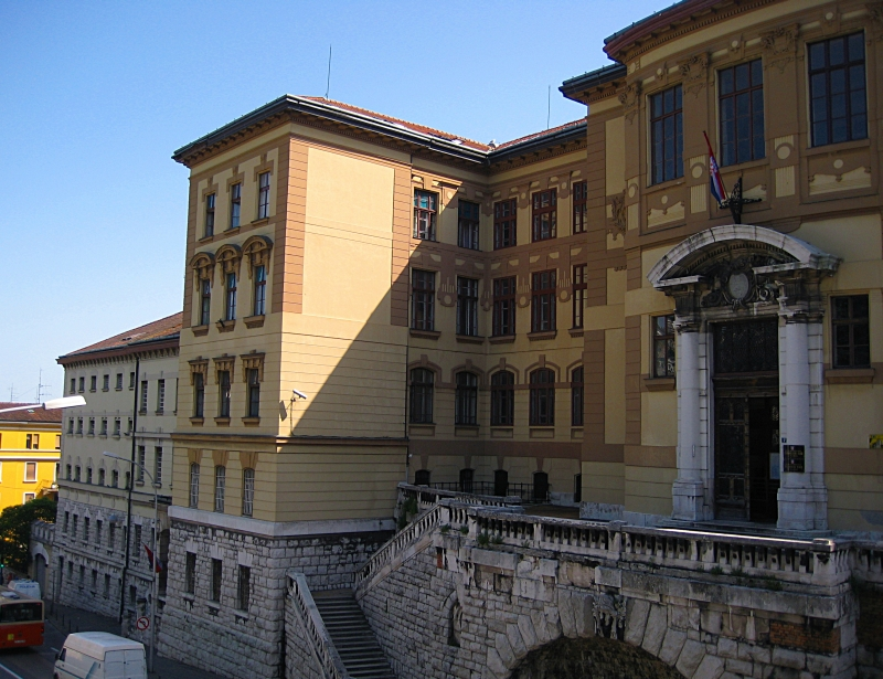 Sudbena palača i istražni zatvor u Rijeci